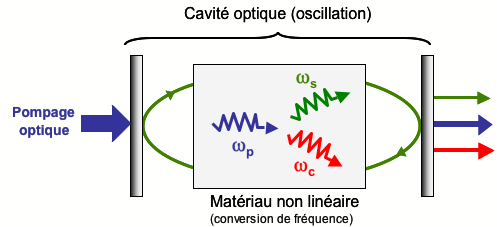 Description : Schéma de principe d'un Oscillateur paramétrique optique. Source : personnelle Statut : Catégorie:Schéma de physique